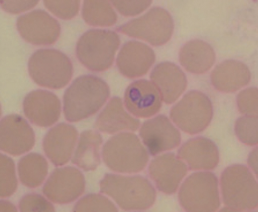 Srpskohrvatski / српскохрватски: babezioza